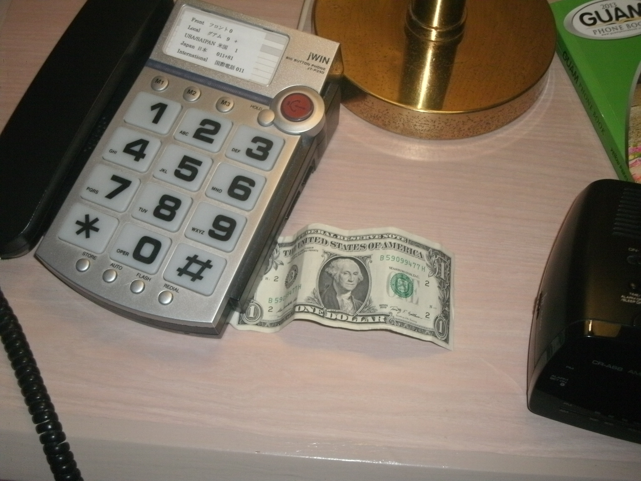 ホテルのルームキーパーに渡すためのチップは、このように、電話機近くに置くのが良い。